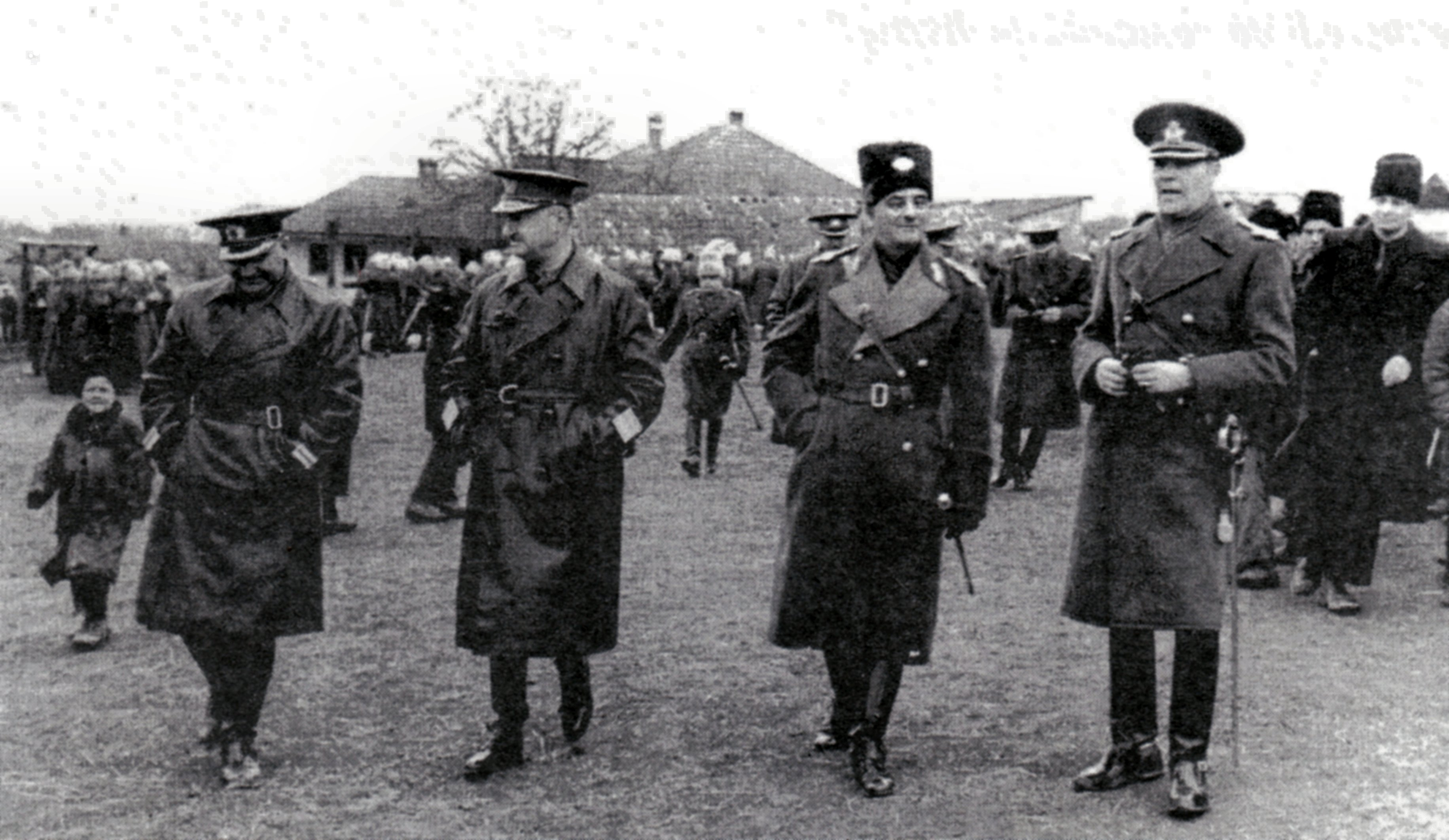 Aurel Racovitză als General, 2. von links, Truppeninspektion in Chișinău 1939